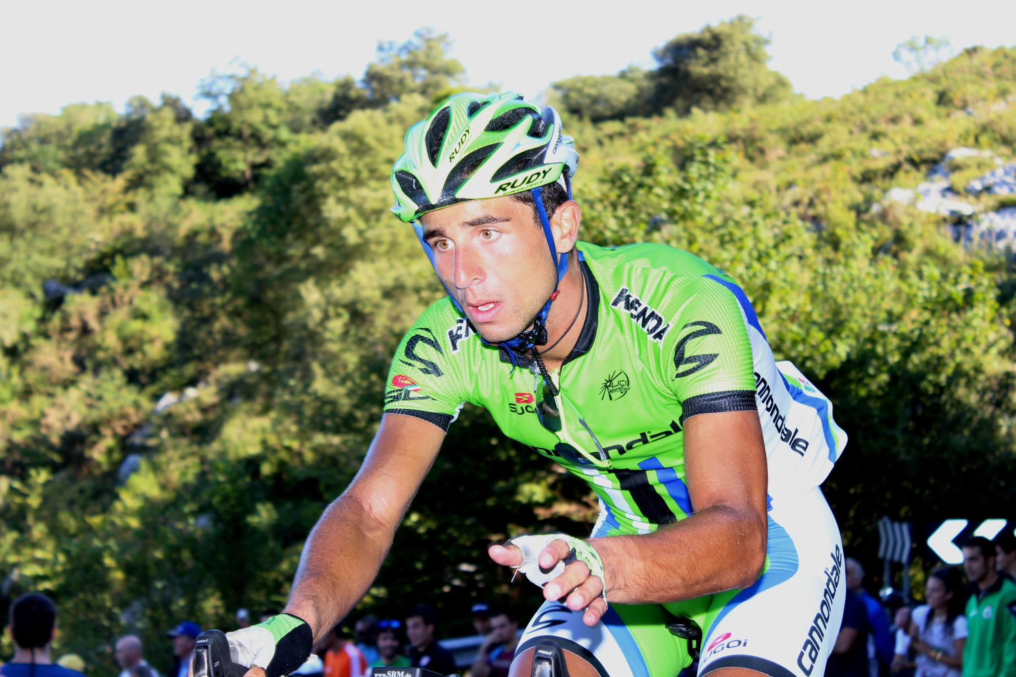 El ciclista italiano, Daniele Ratto, del Cannondale, en plena ascensión a Peña Cabarga en la 18ª etapa de la Vuelta a España 2013